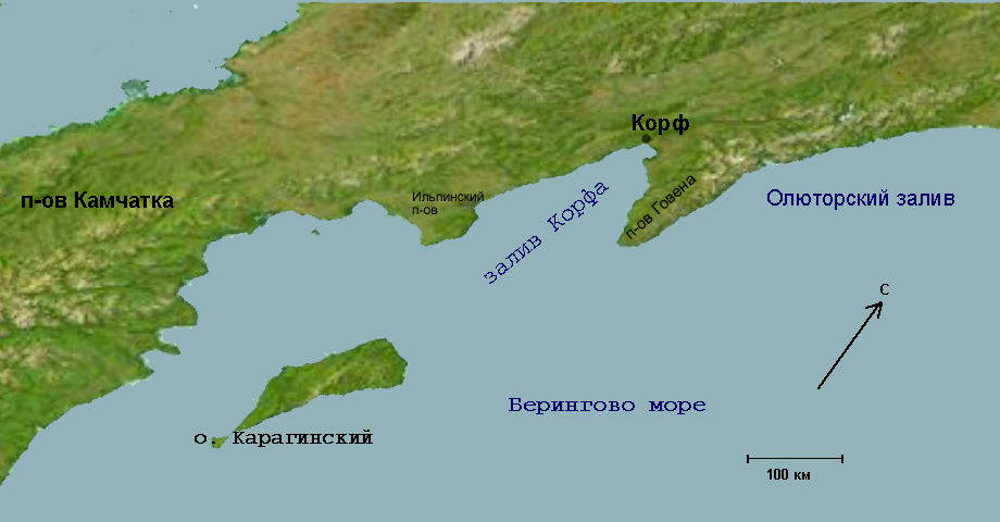 Залив Корфа Корф, остров Карагинский, Ильпинский полуостров, полуостров Говена